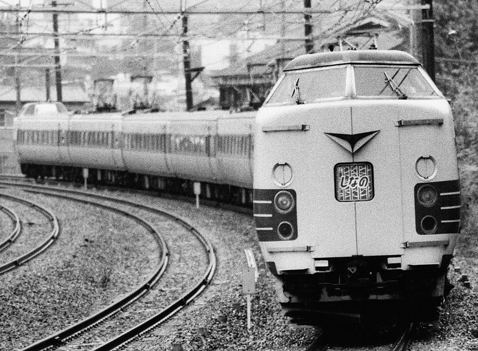 国鉄381系特急形電車 特急「しなの」